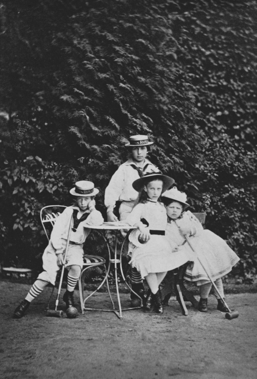 Vier Kinder des deutschen Kaisers Friedrich III , vlnr: Kronprinz Wilhelm von Preußen (* 27. Januar 1859), später Kaiser Wilhelm II Prinz Heinrich von Preußen (* 14. August 1862) Prinzessin Charlotte von Preußen (* 24. Juli 1860) Prinzessin Victoria von Preußen (* 12. April 1866)